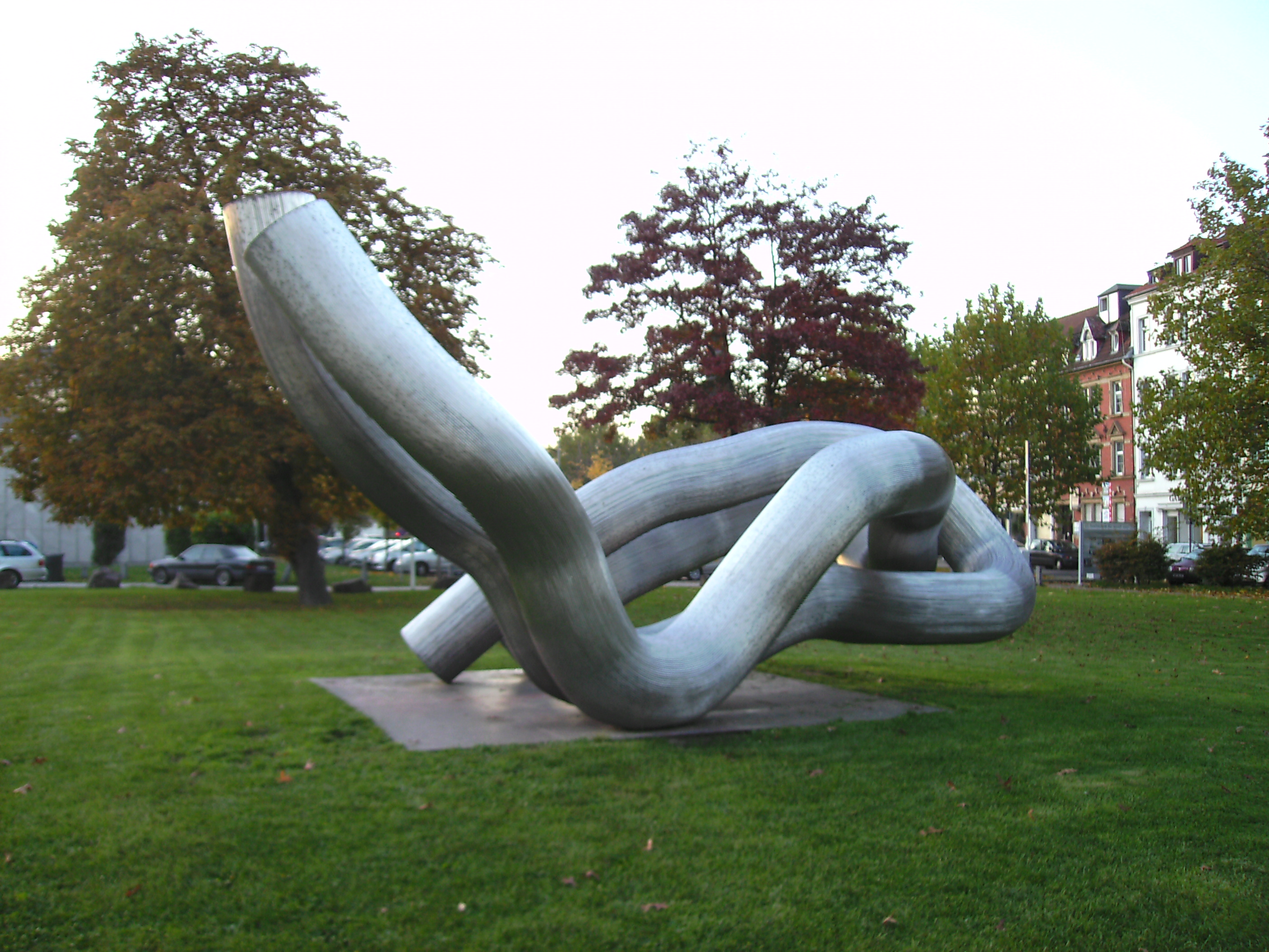 Saarlandmuseum, Moderne Galerie, Außenbereich: Plastik "Gr0ße Gaia"